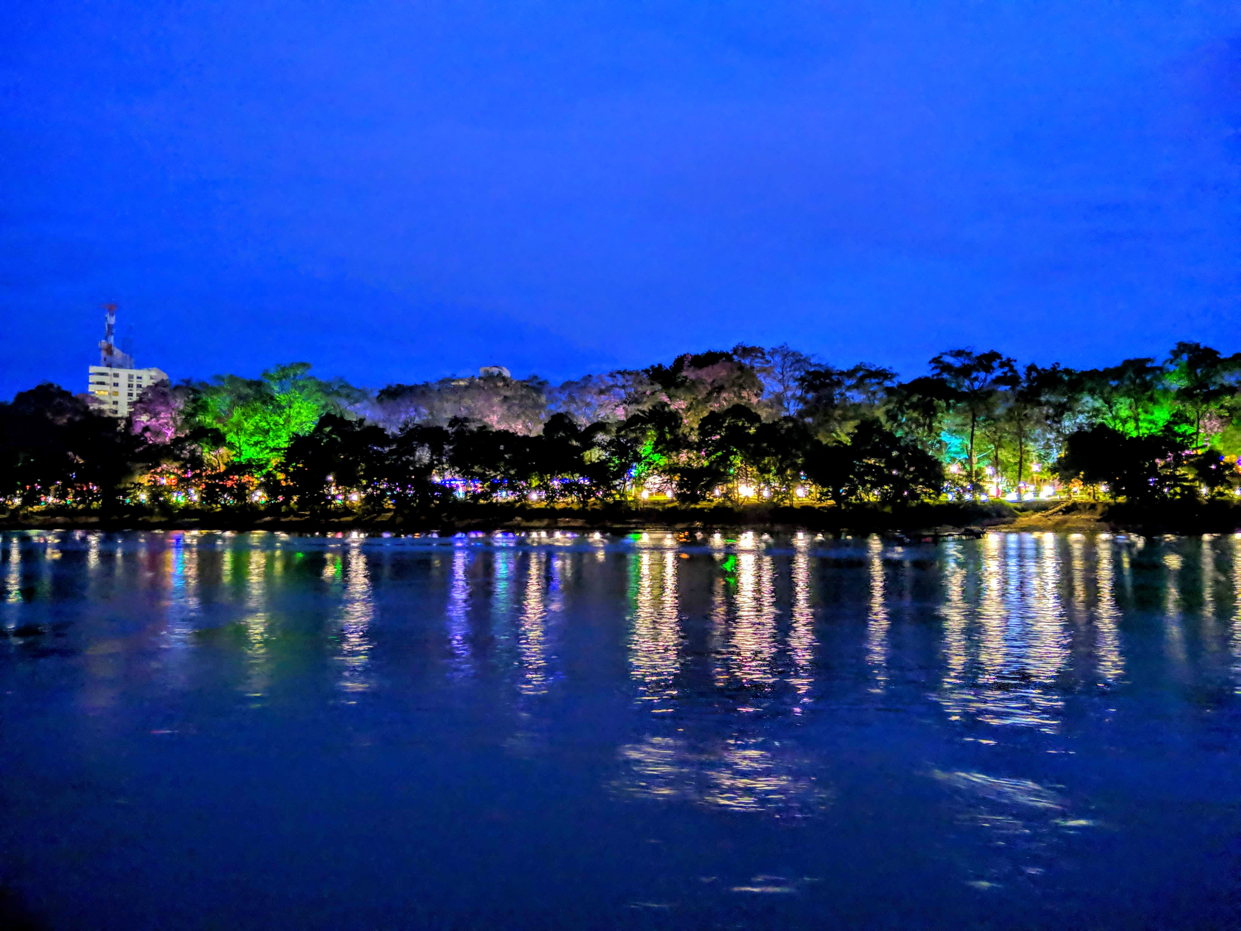 Vista del alumbrado navideño en en parque Ronda Del Sinú, principal atractivo turístico de la ciudad.